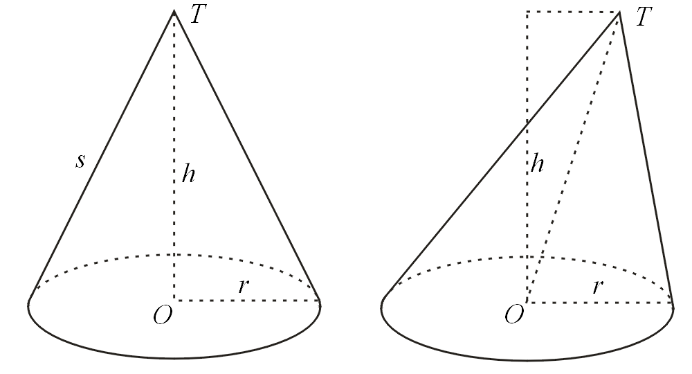 Author: Michael Angelkovich